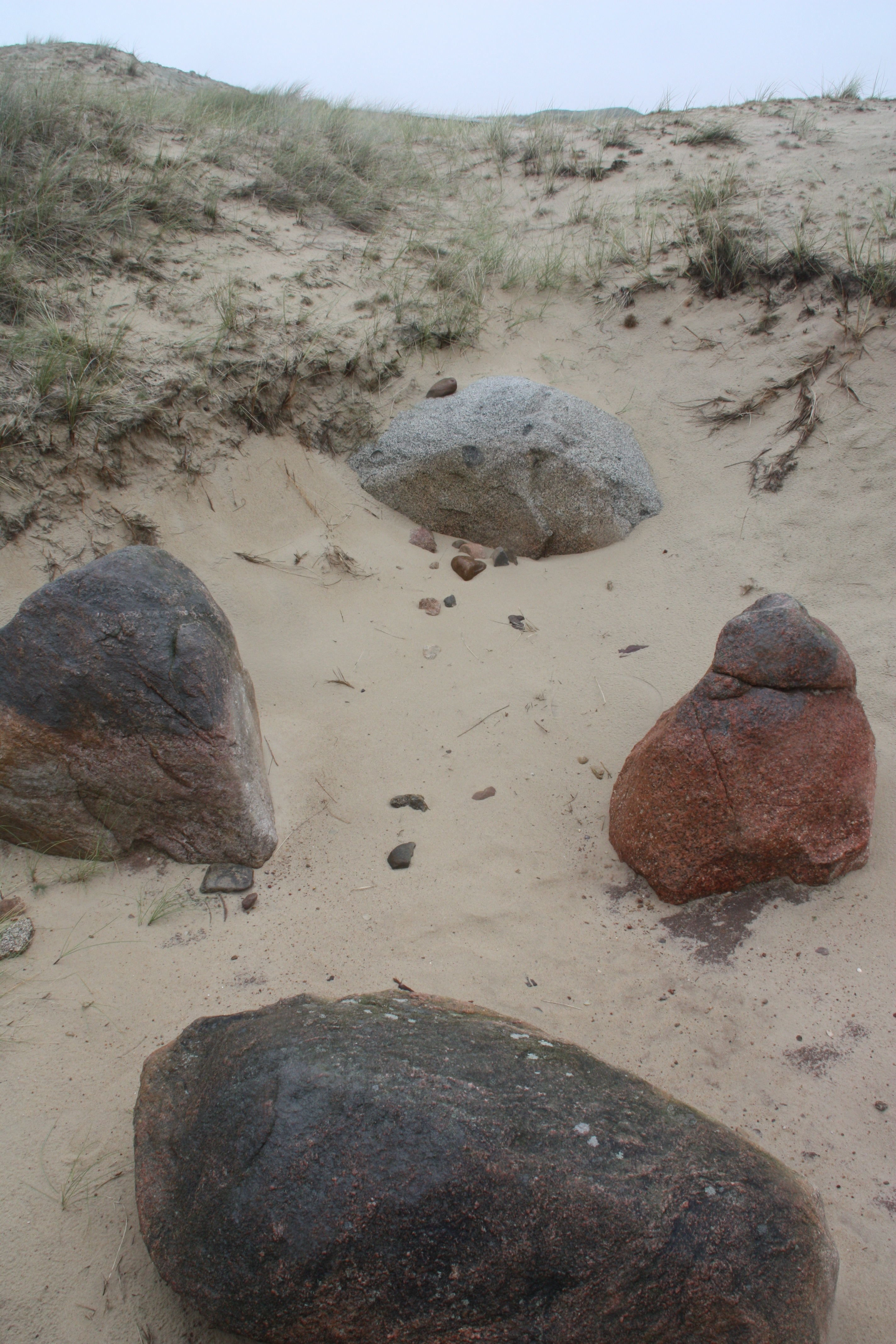 Reste eines Steingrabs nordwestlich der Vogelkoje von Nebel im archäologischen Areal This is a photograph of an architectural monument.It is on the list of cultural monuments of Nebel